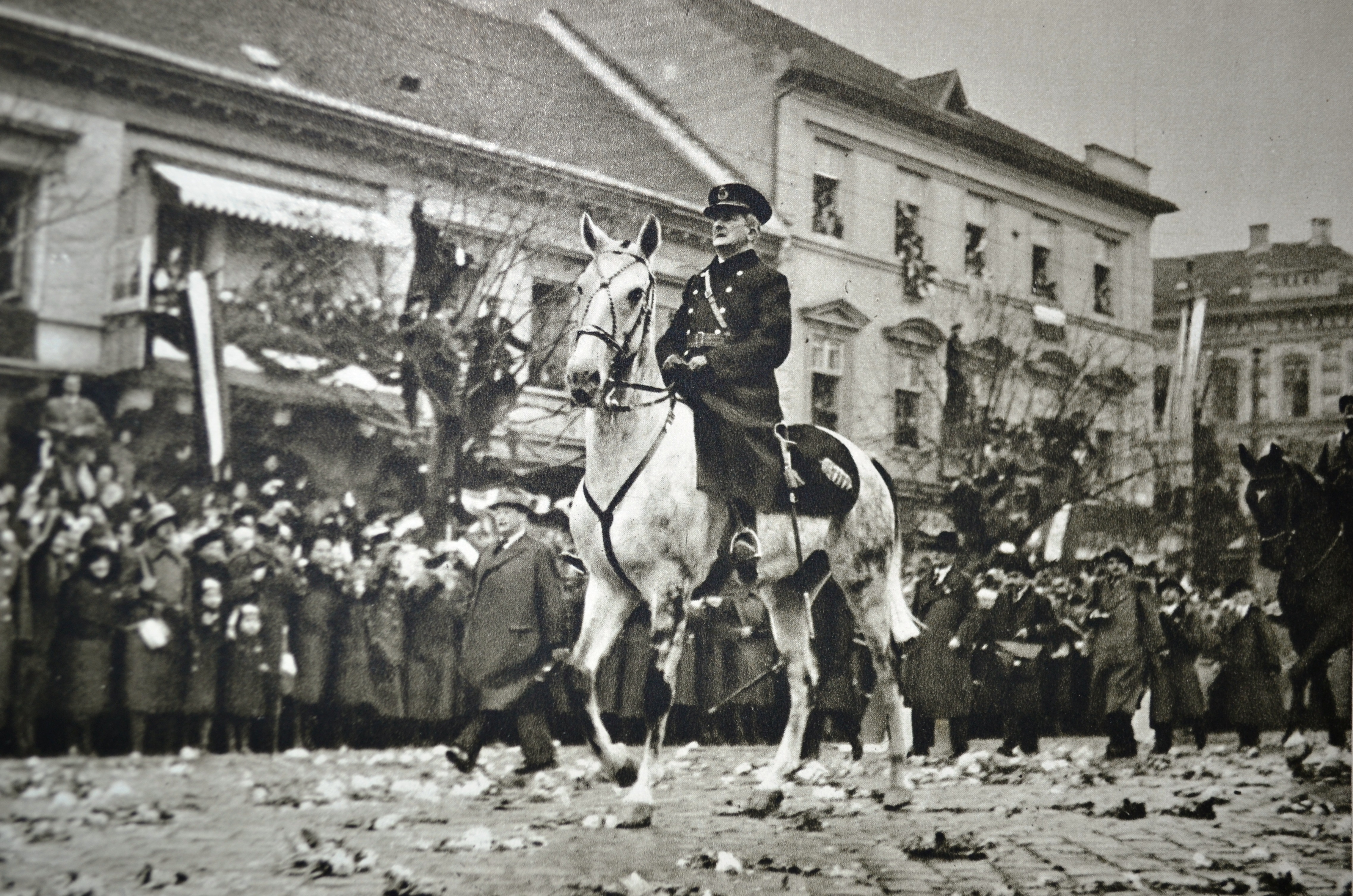 Miklós Horthy na čele maďarského vojska vchádza do Košíc (11. november 1938)